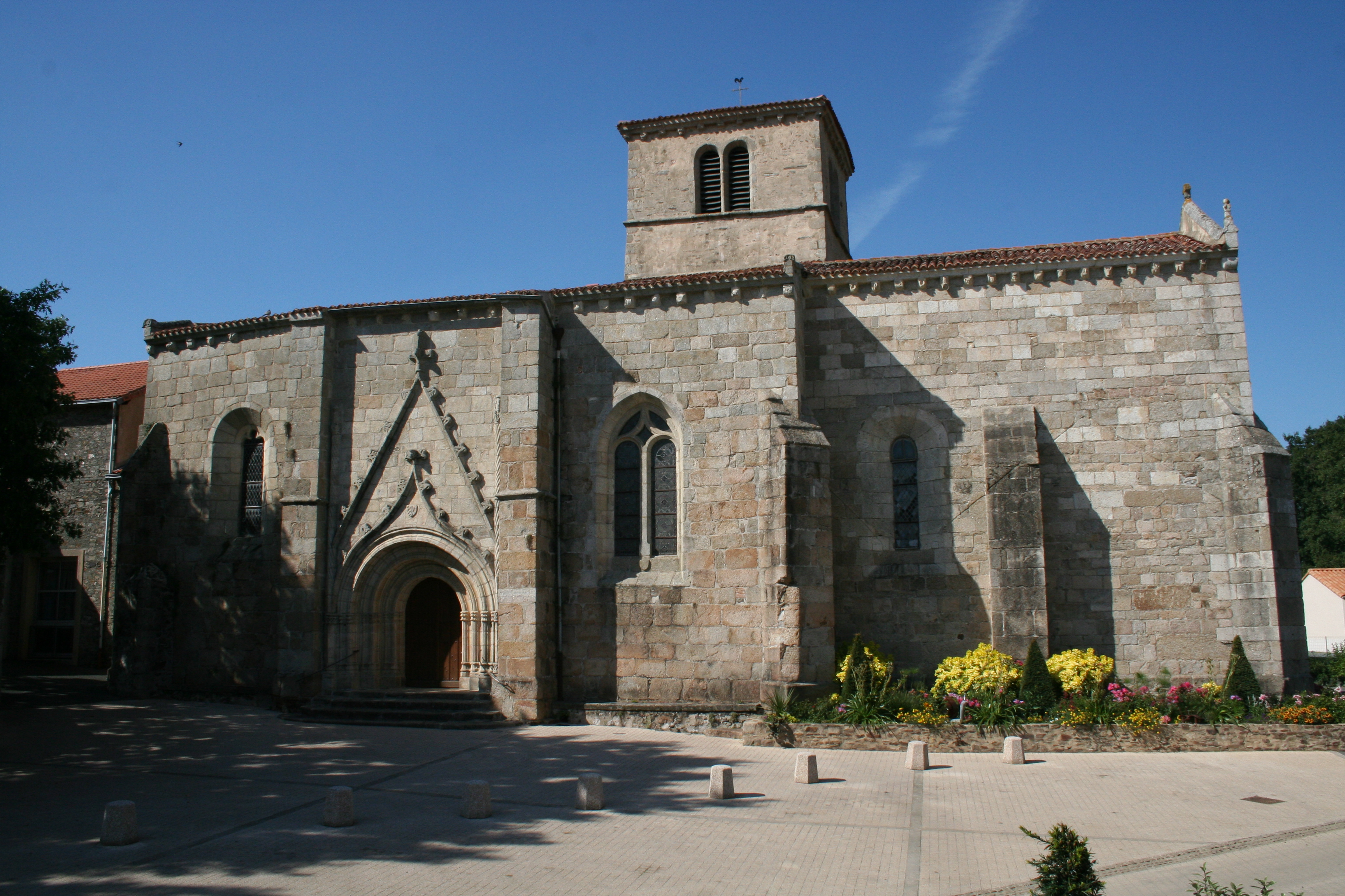 Façade sud